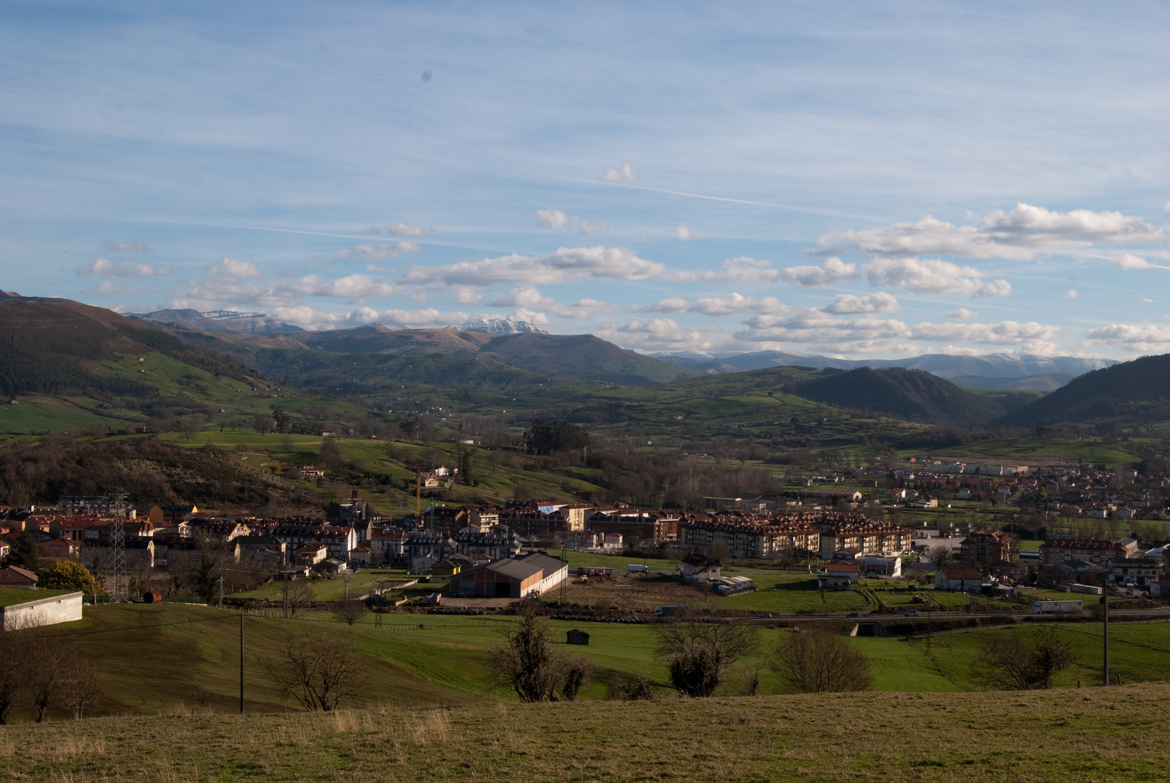 Vista general de Sarón en el municipio de Santa María de Cayón (Cantabria)